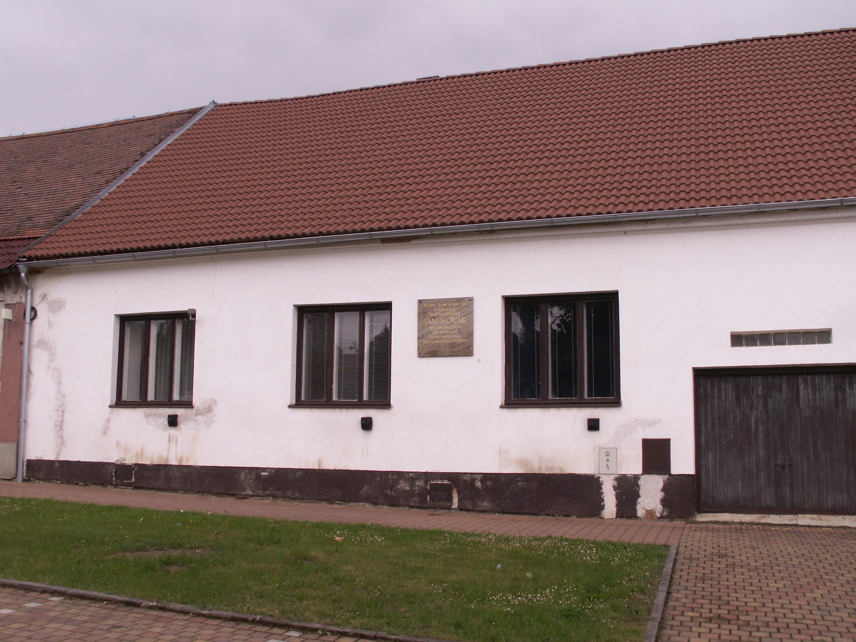 Nová Říše, náměstí, rodný dům skladatele Jana Nováka (1921-1984)